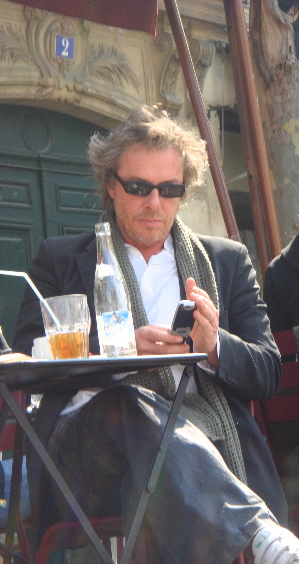 Tab Cy